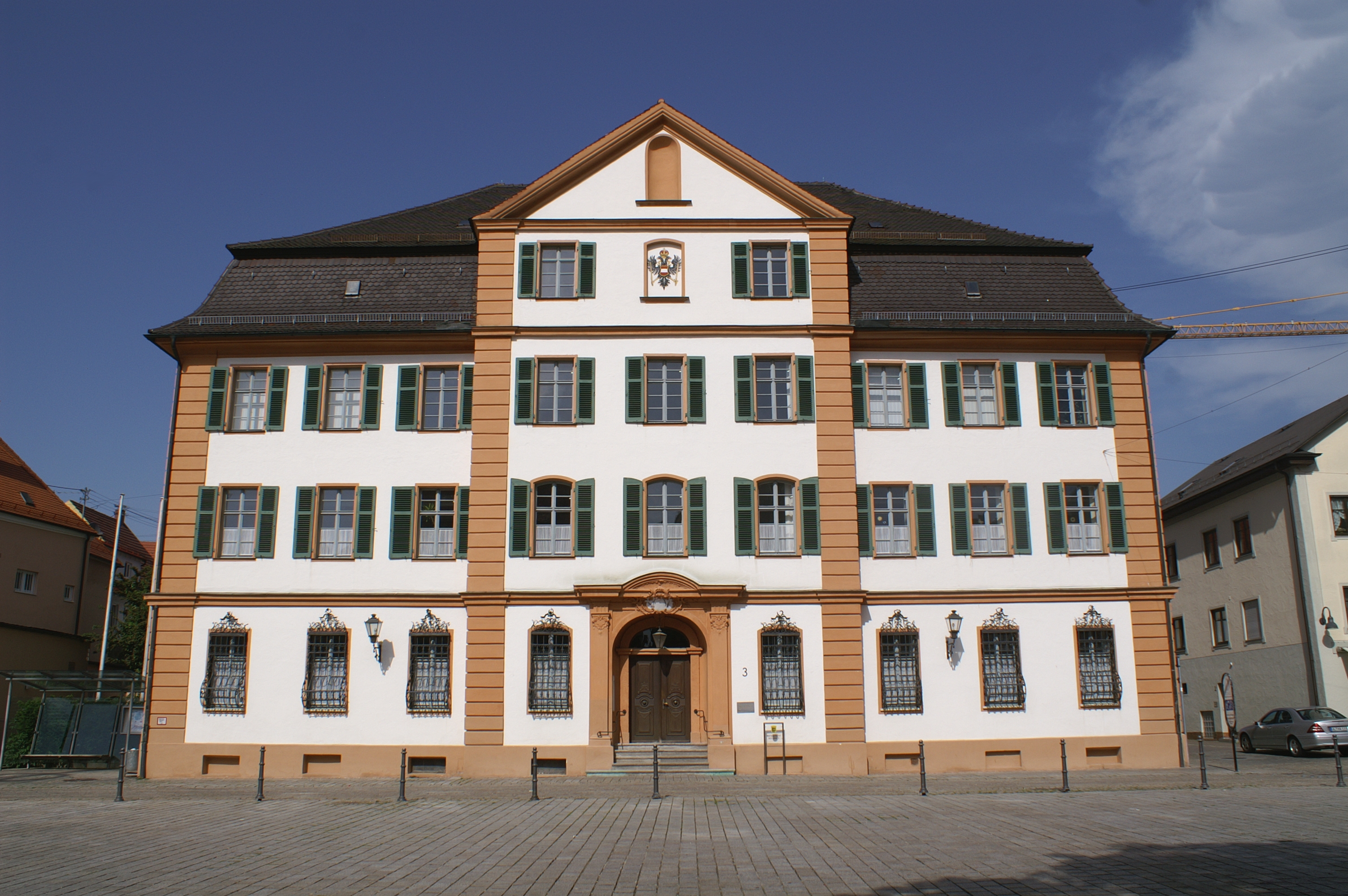 Das Ständehaus in Ehingen (Donau) wurde 1750 erbaut. Es diente von 1769/70 bis 1805 als Amtshaus der Schwäbisch-Österreichischen Landstände. Heute befindet sich in dem Gebäude das Amtsgericht